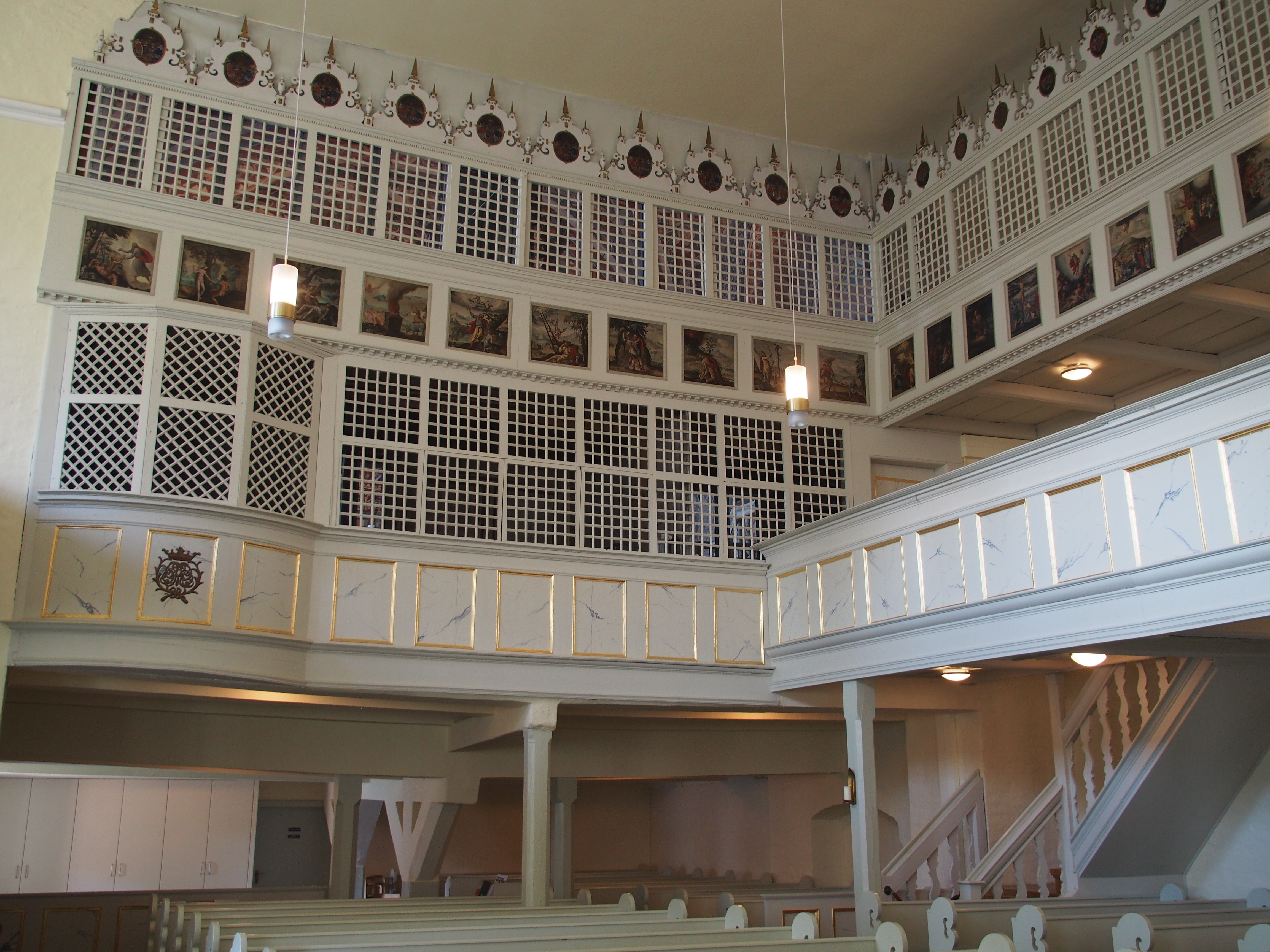 Nord- und Westempore mit Priech der Äbtissin (links) in der St. Marien-Kirche Wienhausen